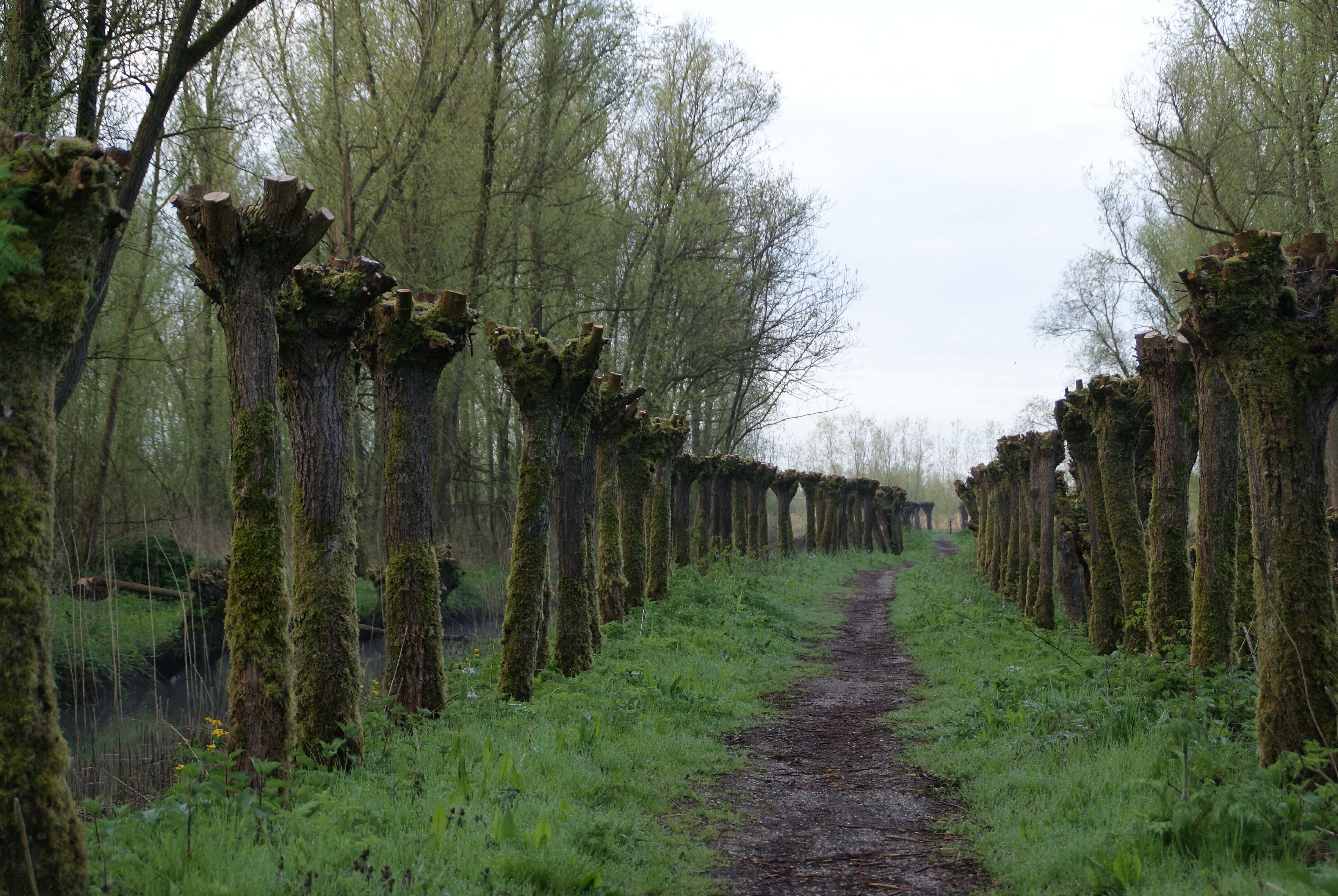 Wandelpad door natuurgebied Klein Profijt